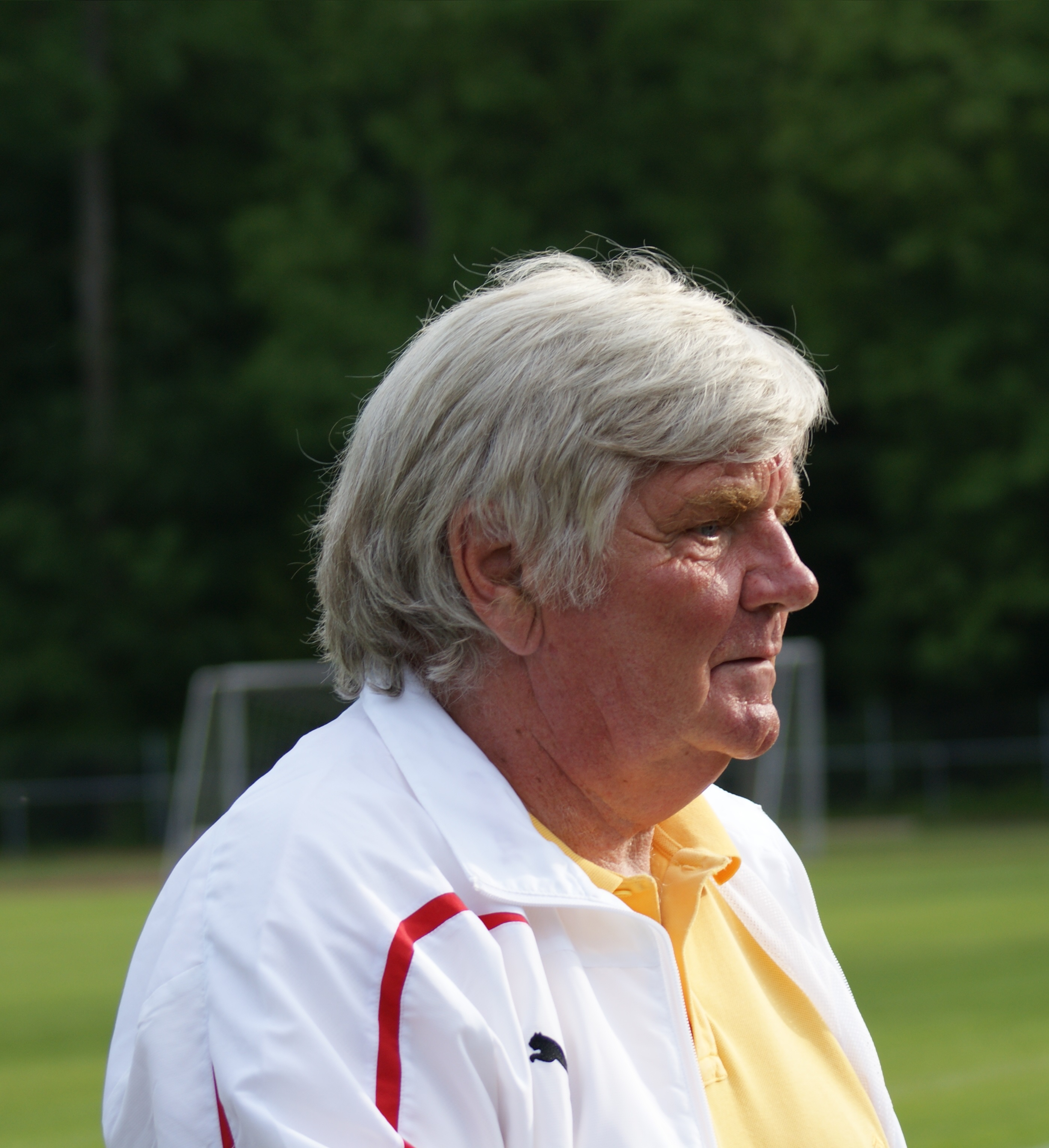 Jürgen Sundermann im Sommer bei einem Benefizspiel 2012